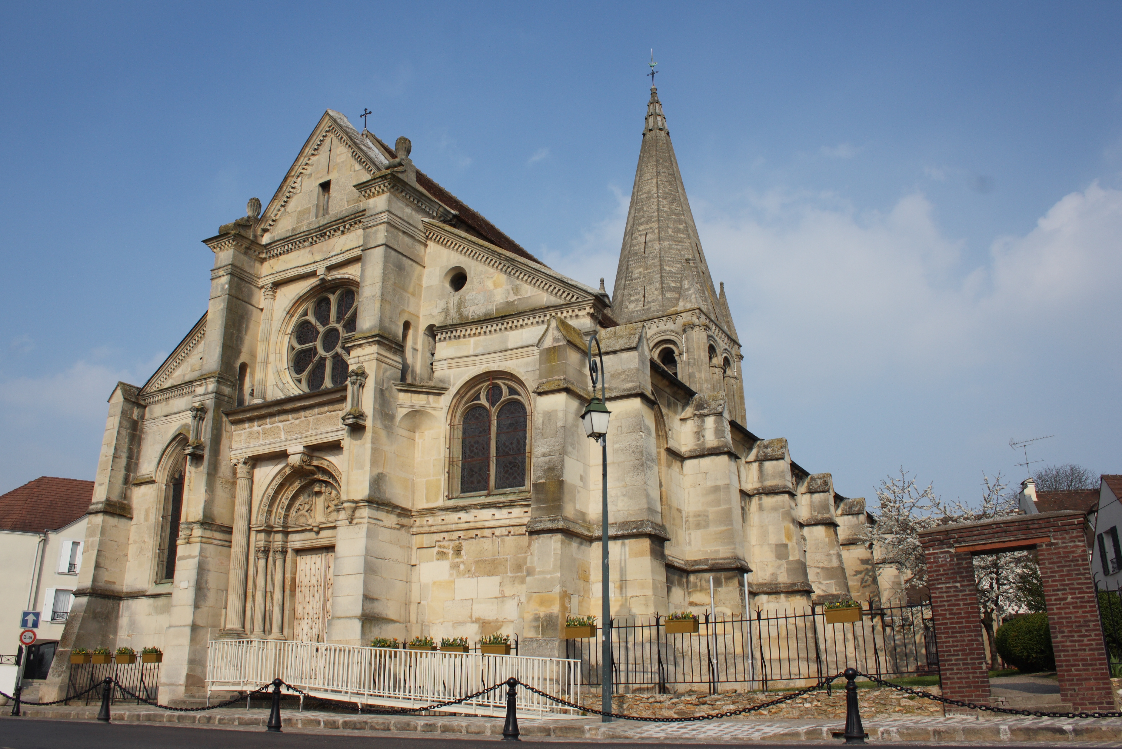 Kirche Saint-Pierre-et-Saint-Paul in Sarcelles